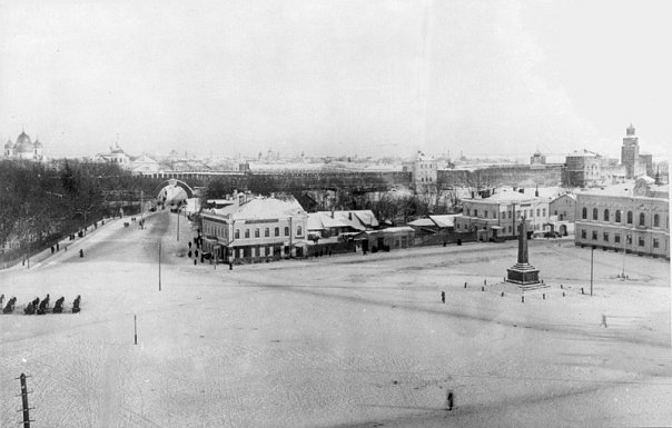 Новгород. Софийская площадь